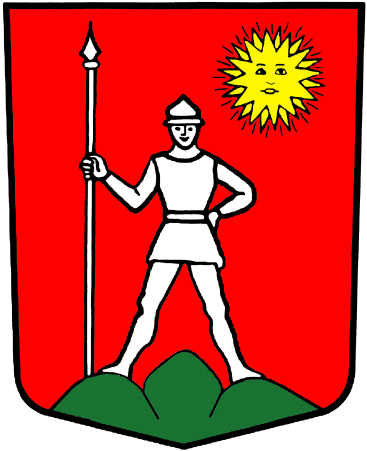 Wappen von Veyras Kanton Wallis Schweiz